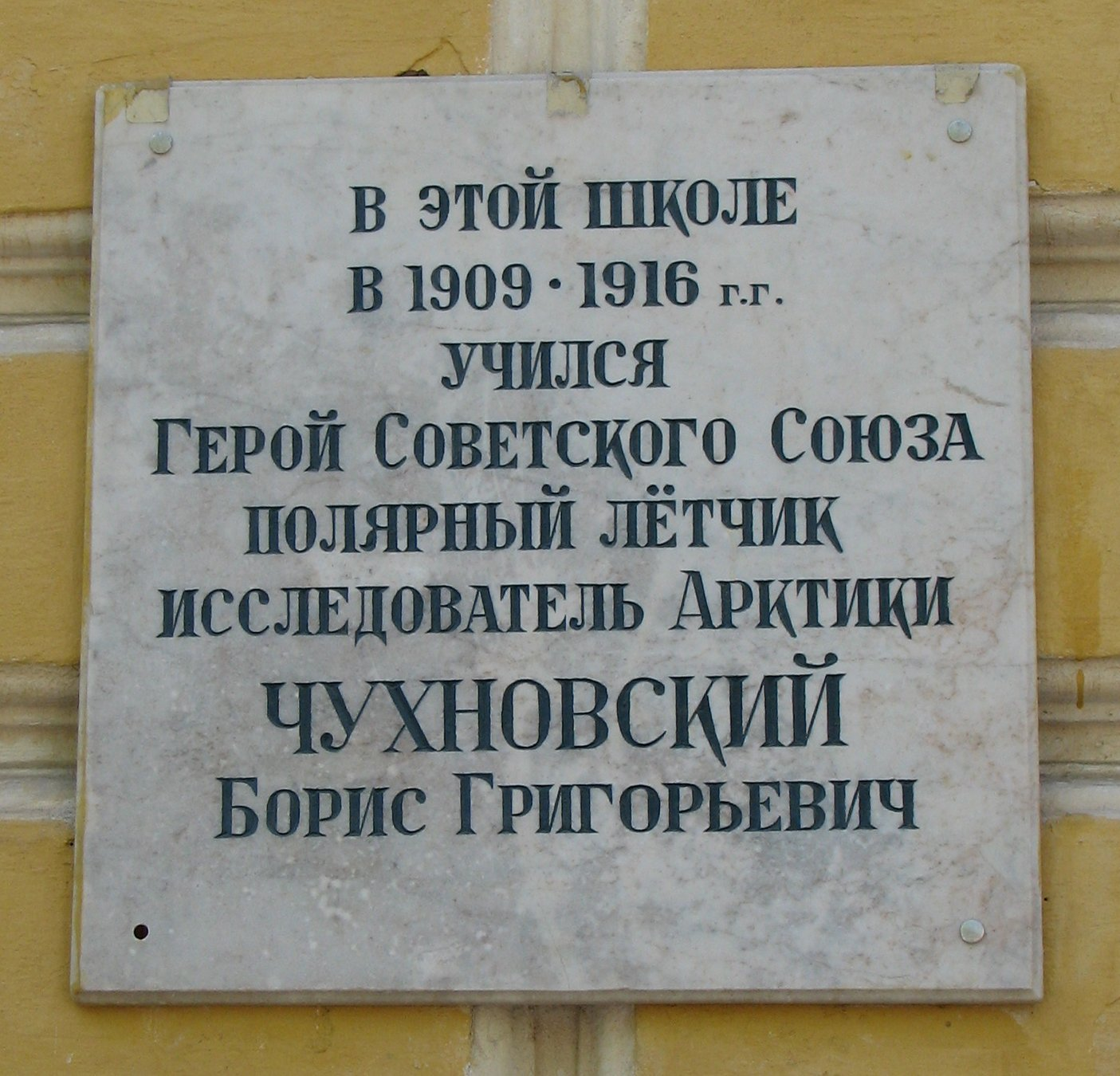 Мемориальная доска, посвящённая лётчику Борису Григорьевичу Чухновскому. Школа № 4, Гатчина